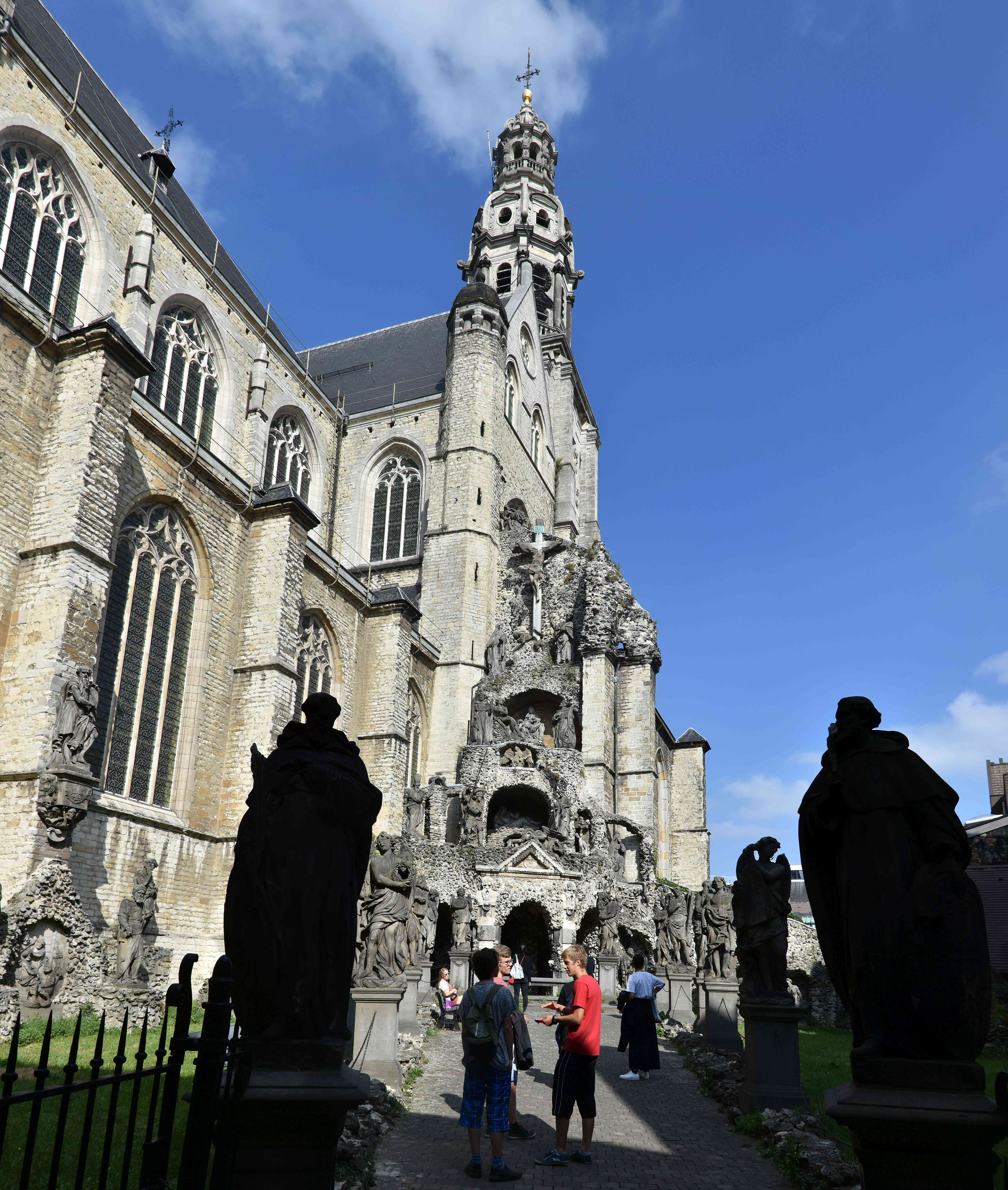 Sint-Pauluskerk (Antwerpen) Calvarie 19-08-2018 This photo of immovable heritage has been taken in the Flemish Region